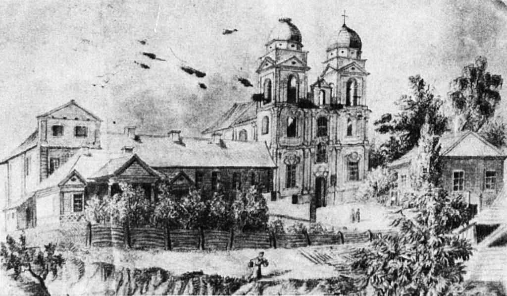 Беларуская (тарашкевіца): Мазыр (Mazyr), рог вуліц Міхайлаўскай (vulica Michajłaŭskaja) і Замкавай (vulica Zamkavaja). Касьцёл Сьвятога Міхала Арханёла і кляштар бэрнардынаў, збудаваны з фундацыі палкоўніка Стэфана Лошкі.